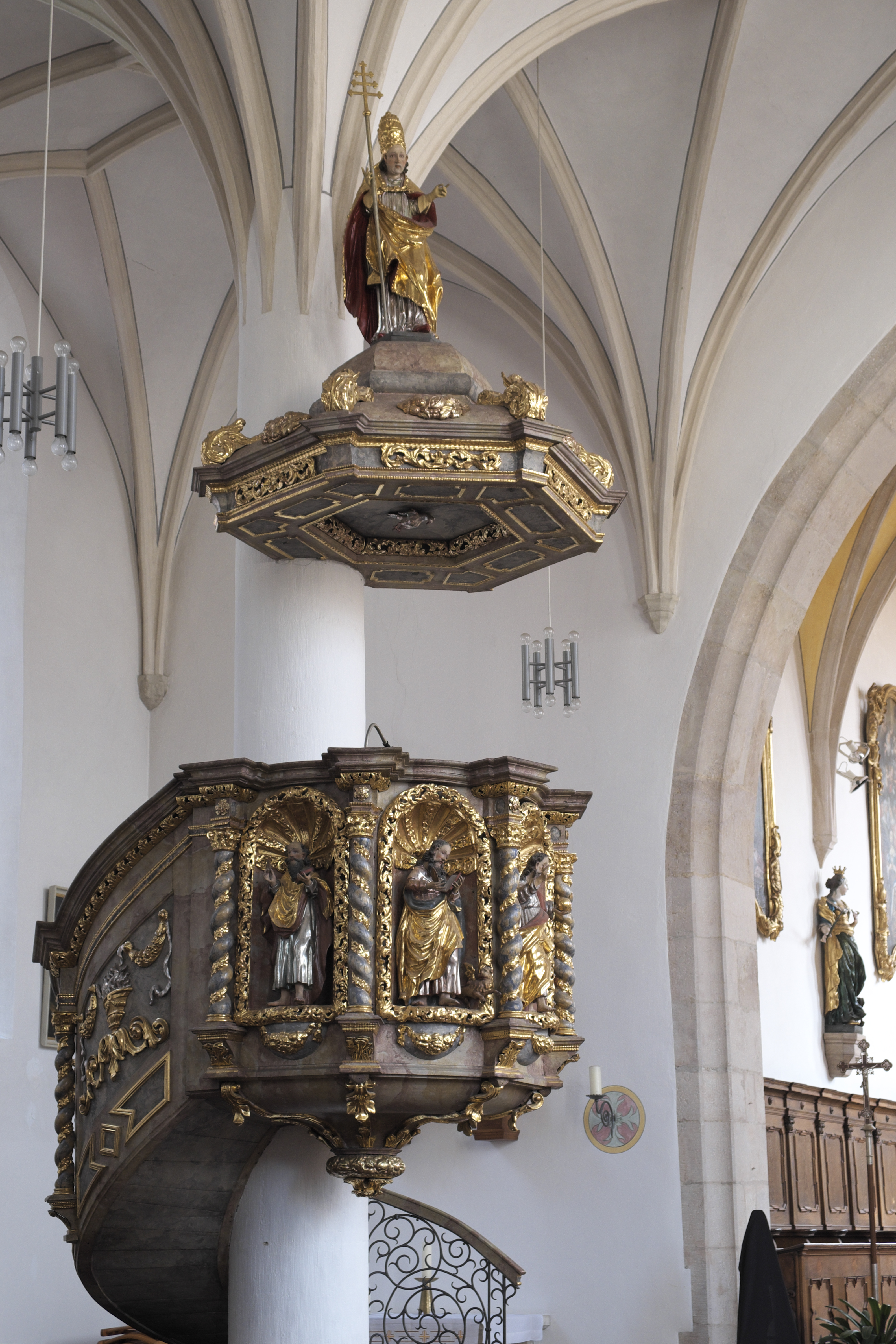 Katholische Pfarrkirche St. Barbara in Abensberg im Landkreis Kelheim in Niederbayern (Bayern), barocke Kanzel von 1698